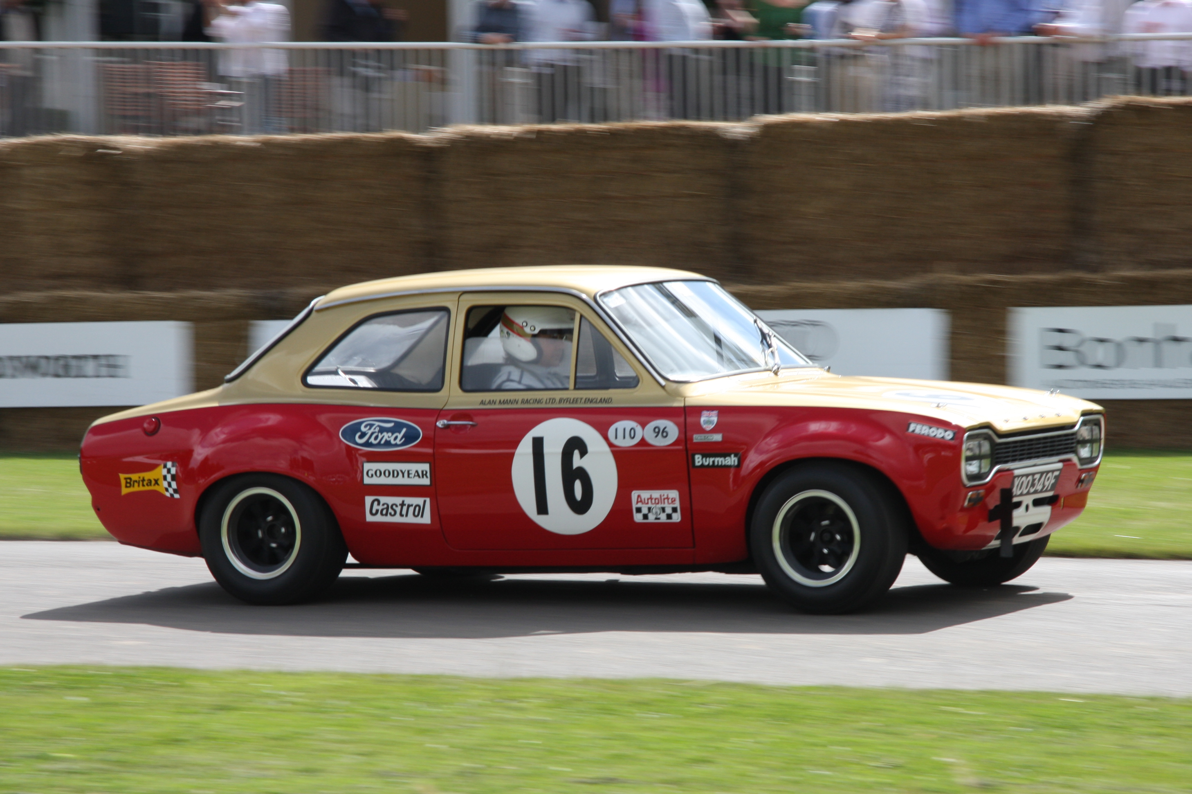 Built 1968. 1.6 litre 4 cylinder